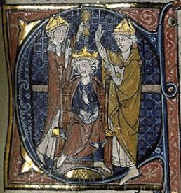 Couronnement de Chilpéric II. Grandes Chroniques de France. Paris, Bibliothèque Sainte-Geneviève, Manuscrit 782, fol. 100.